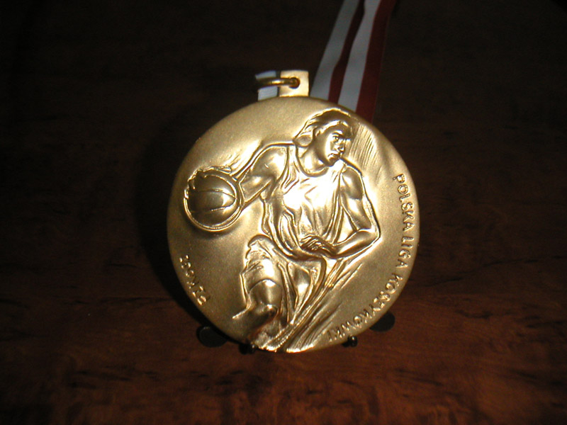 Złoty medal - Polska Liga Koszykówki